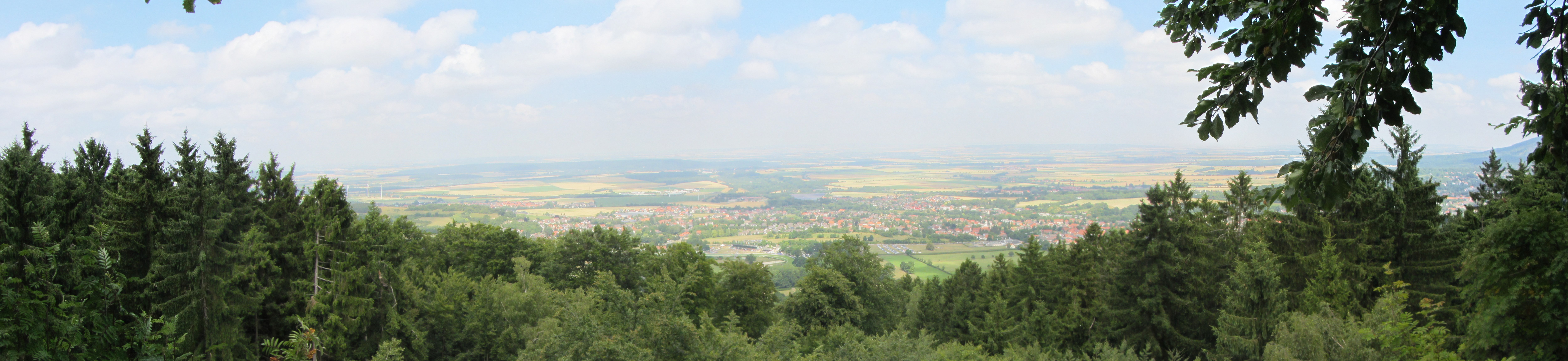 Panorama von Bad Harzburg vom Elfenstein im Harz